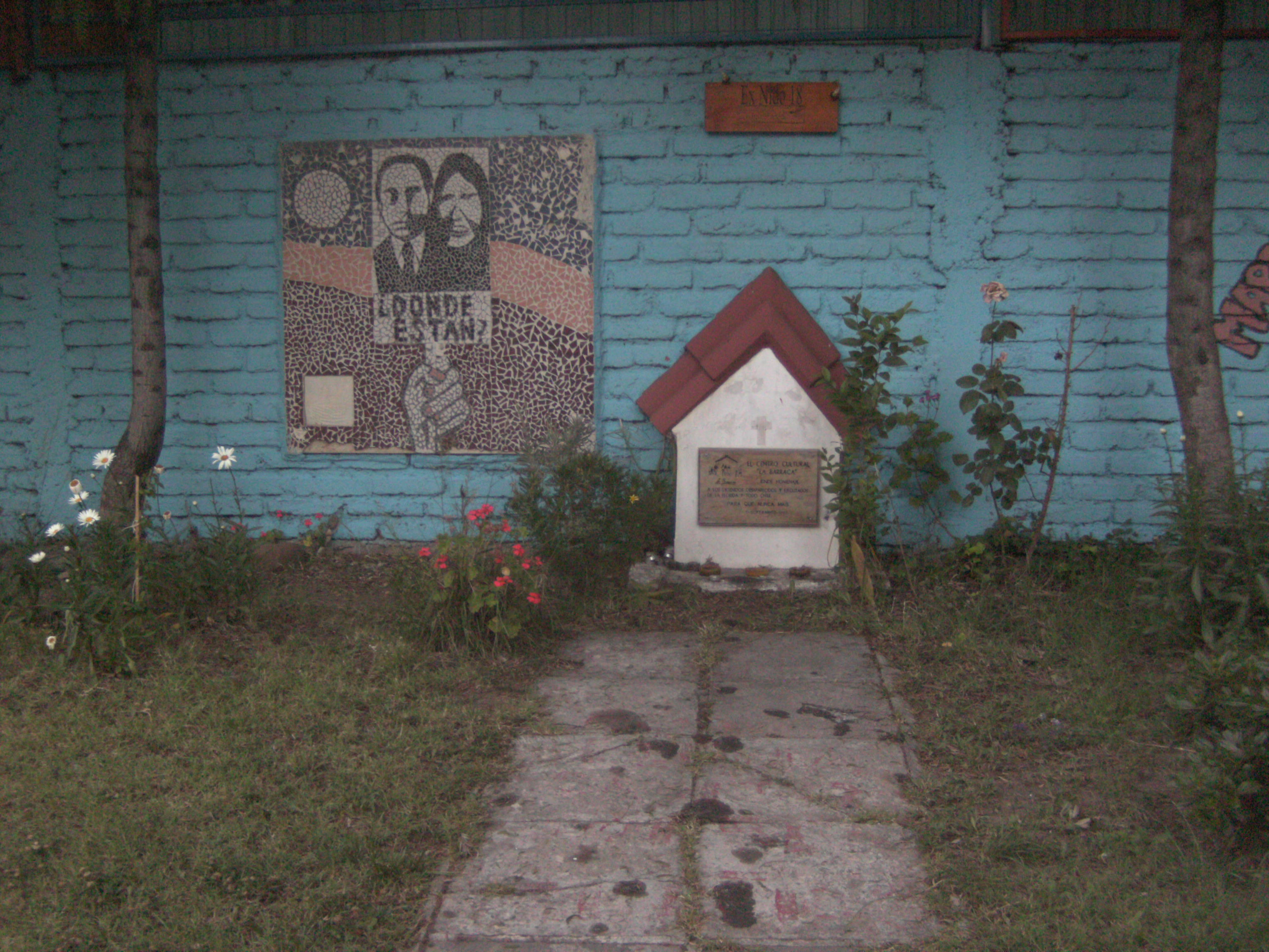 Placas y animita en recuerdo de´centro de detención clandestino "Nido 18" del régimen militar chileno de Pinochet. Està ubicada en calle Perú, La Florida, frente al paradero 18 de autobuses, de ahí el nombre.